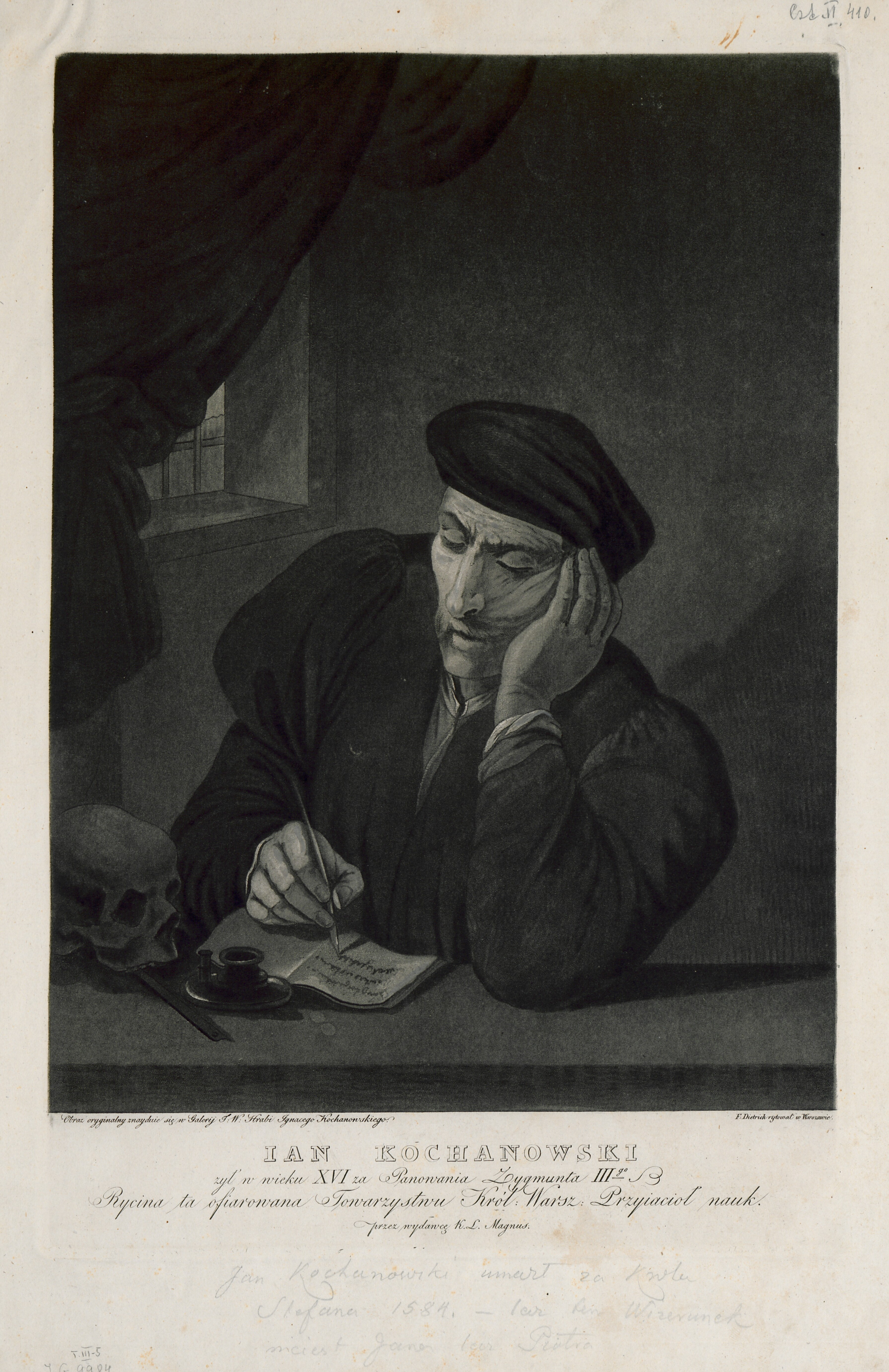 Piotr Kochanowski na akwatincie Fryderyka Dietricha, (na grafice błędny podpis) 1828 r.